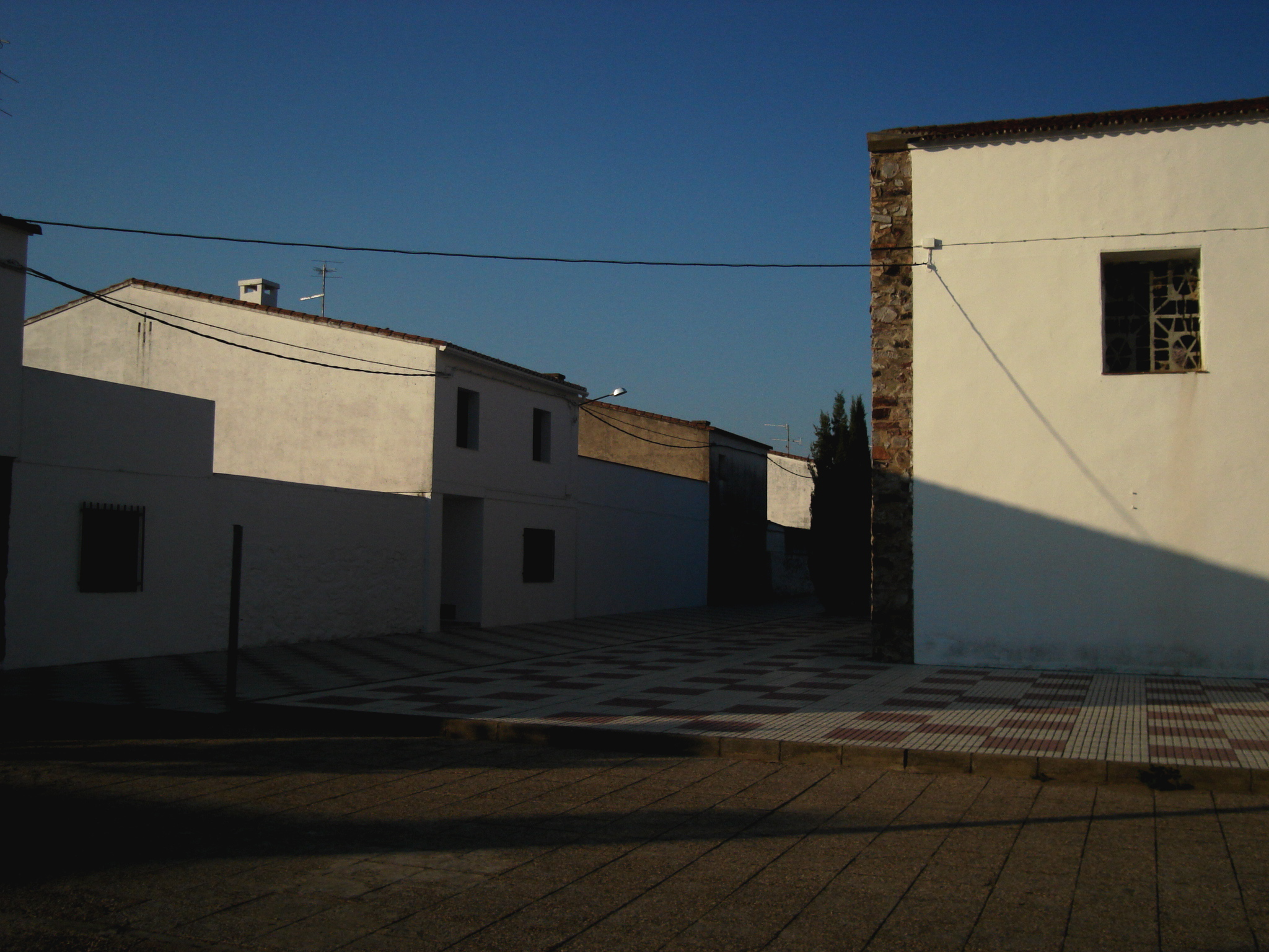 Conquista del Guadiana, Don Benito, provincia de Badajoz, Extremadura, España.